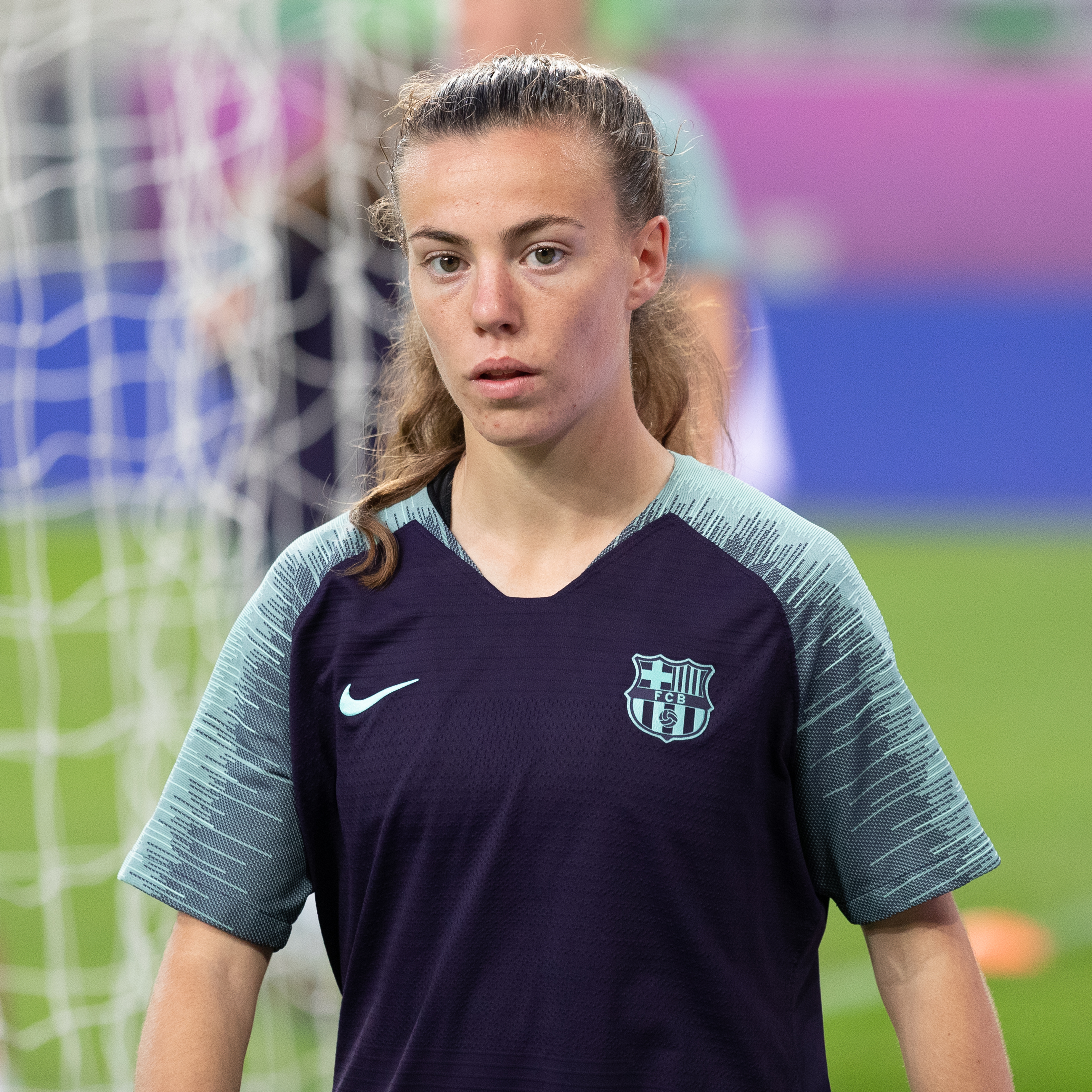 Fußball, Frauen, UEFA Women's Champions League, Olympique Lyonnais - FC Barcelona; Candela Andujar (FC Barcelona, 23) beim Abschlusstraining; Porträt, Einzelbild